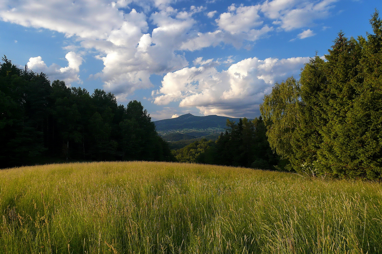 Ještěd ze Zábrdského kopce